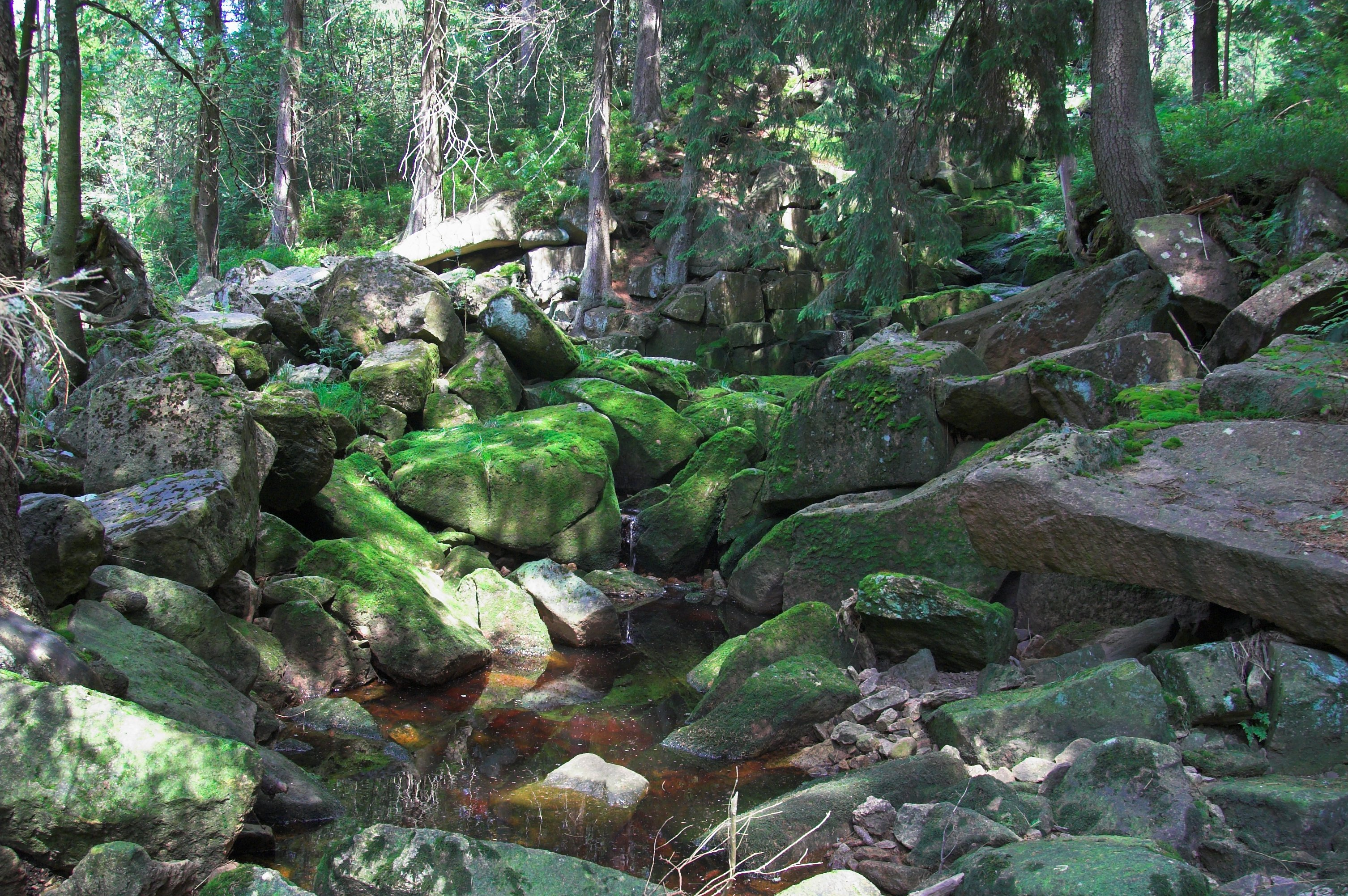 Der untere Teil der Großen Ausflut des Oderteichs